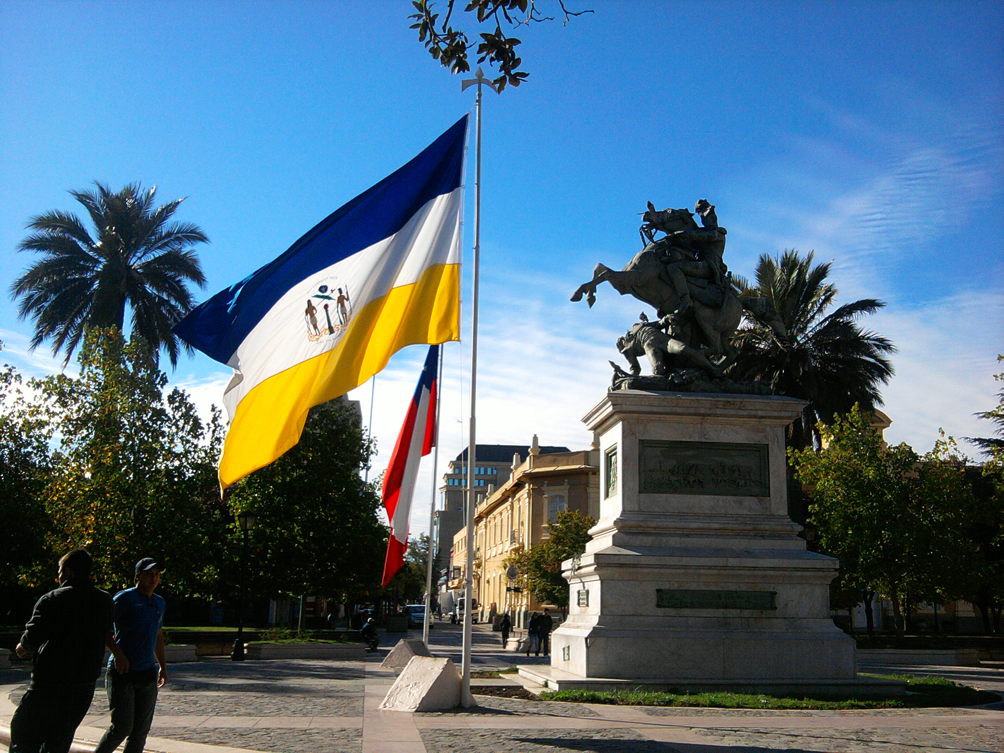 Plaza de los Héroes, Rancagua, con la bandera de la Patria Vieja de Chile flameando en primer plano.